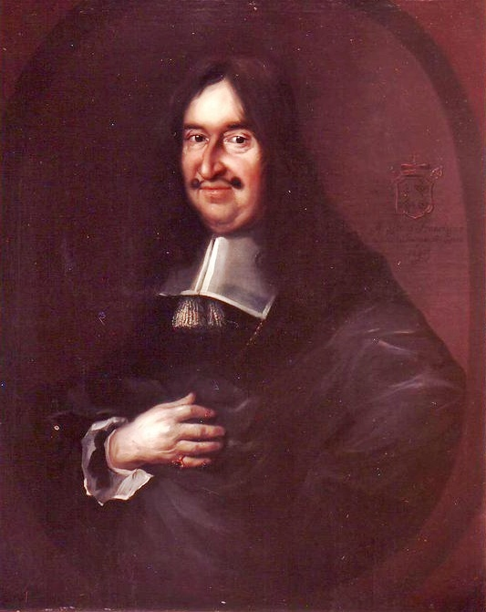 Bischof Anselm Franz von Ingelheim, Mainz, + 1695